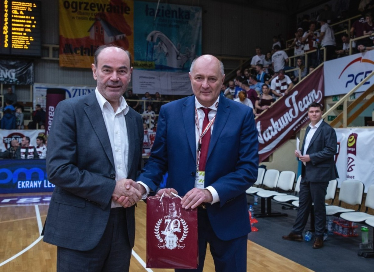 Stargard. Tadeusz Gutowski, Ryszard Szczechowiak - 70 lecie Spójni Stargard